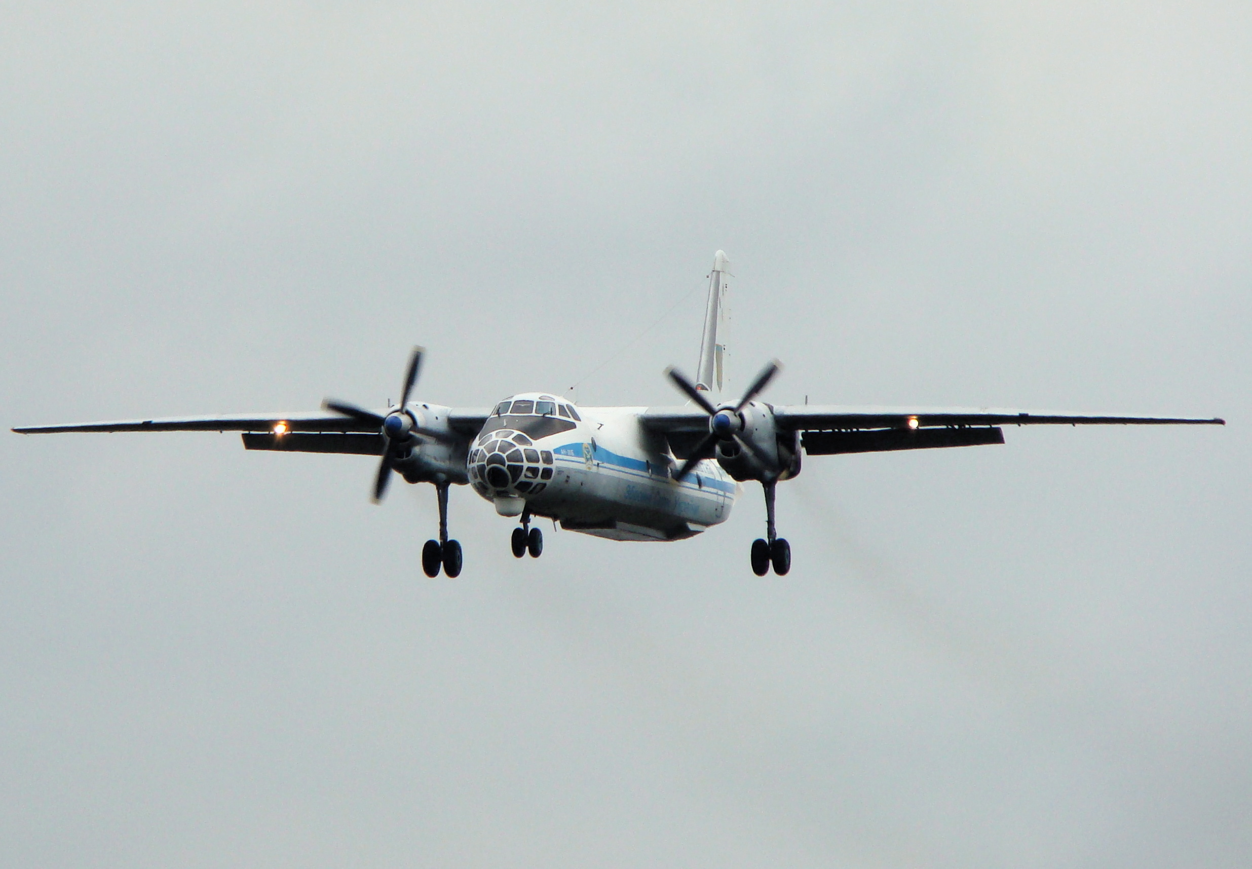 Ан-30 Украинских ВВС